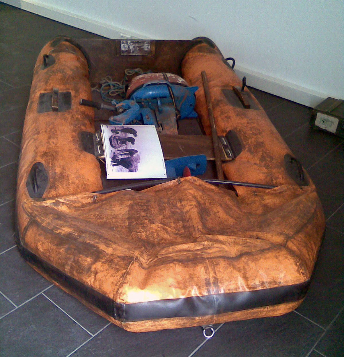 Kühlungsborn,_Ostseewachturm,_Ausstellung,_Fluchtboot._1